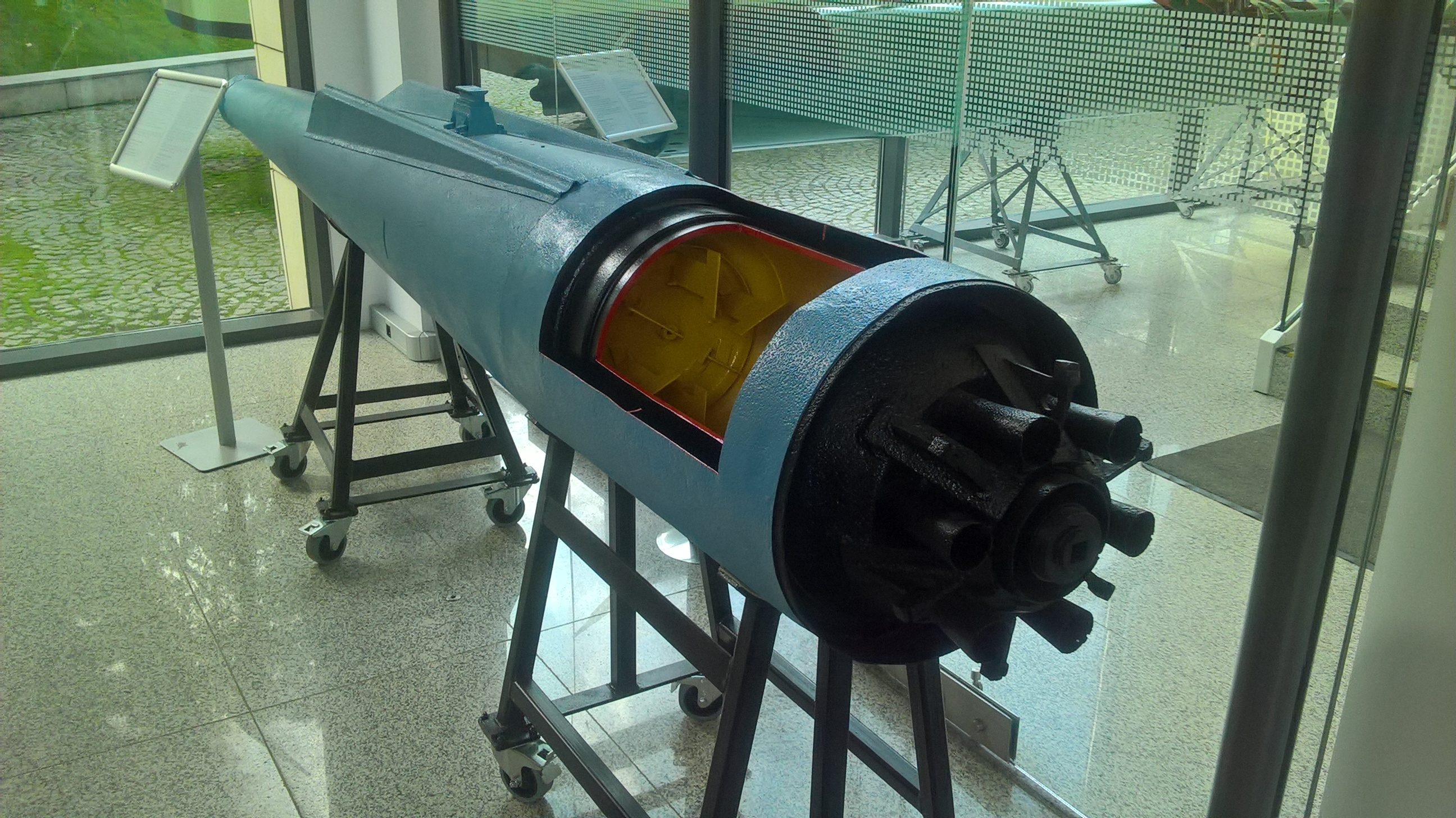 Eksperymentalna niemiecka bombotorpeda BT 1000 RS eksponowana w Muzeum Marynarki Wojennej w Gdyni.